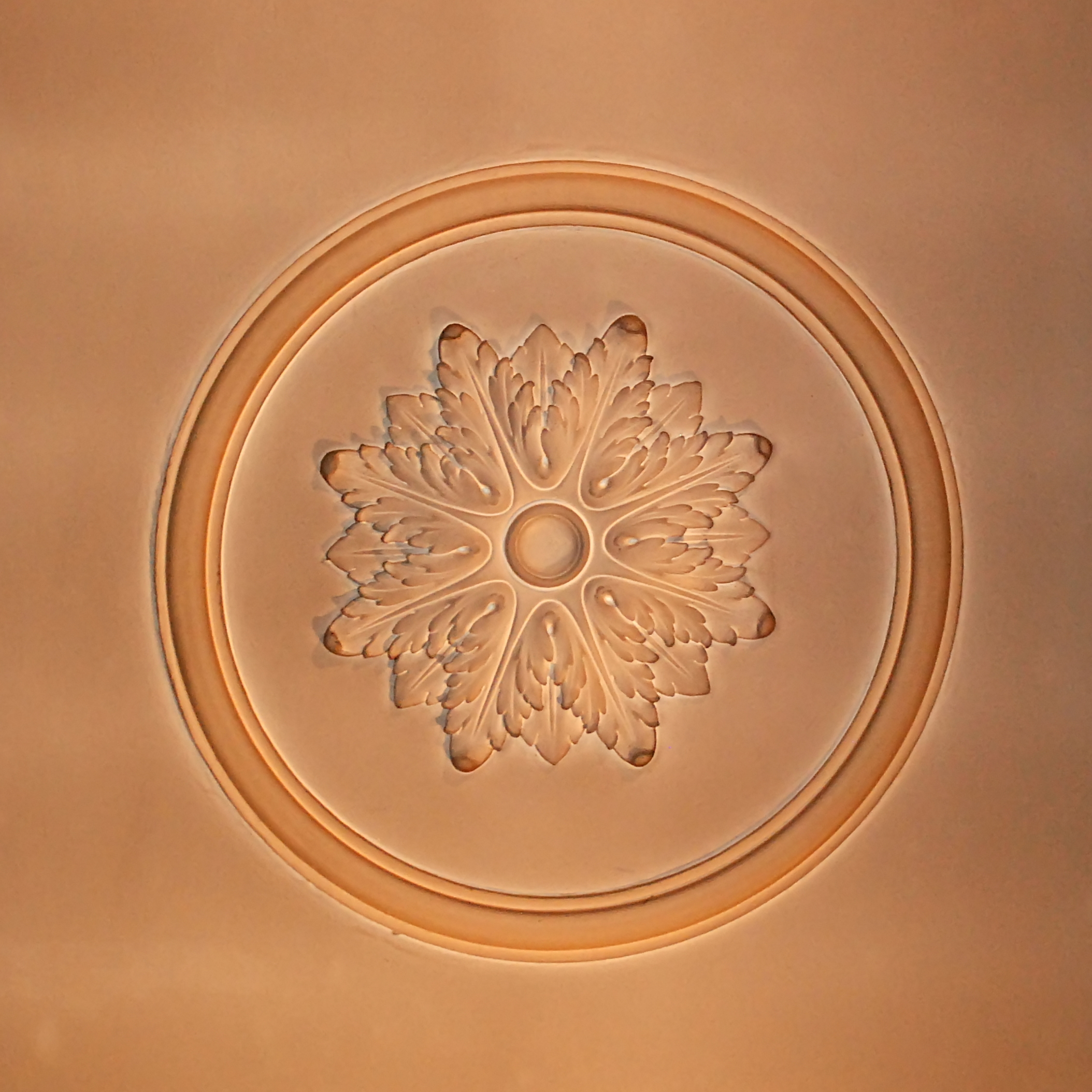 Belgique - Brabant wallon - Ottignies - Église Saint-Rémi